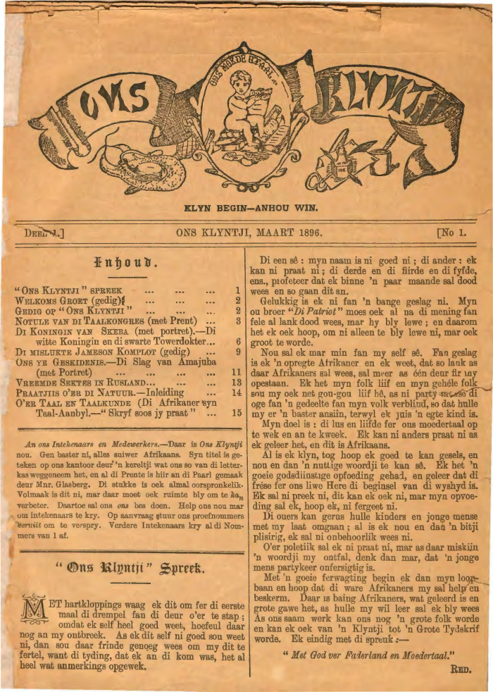 Bladsy 3 van die eerste uitgawe van Ons Kleintjie, 22 Maart 1896.